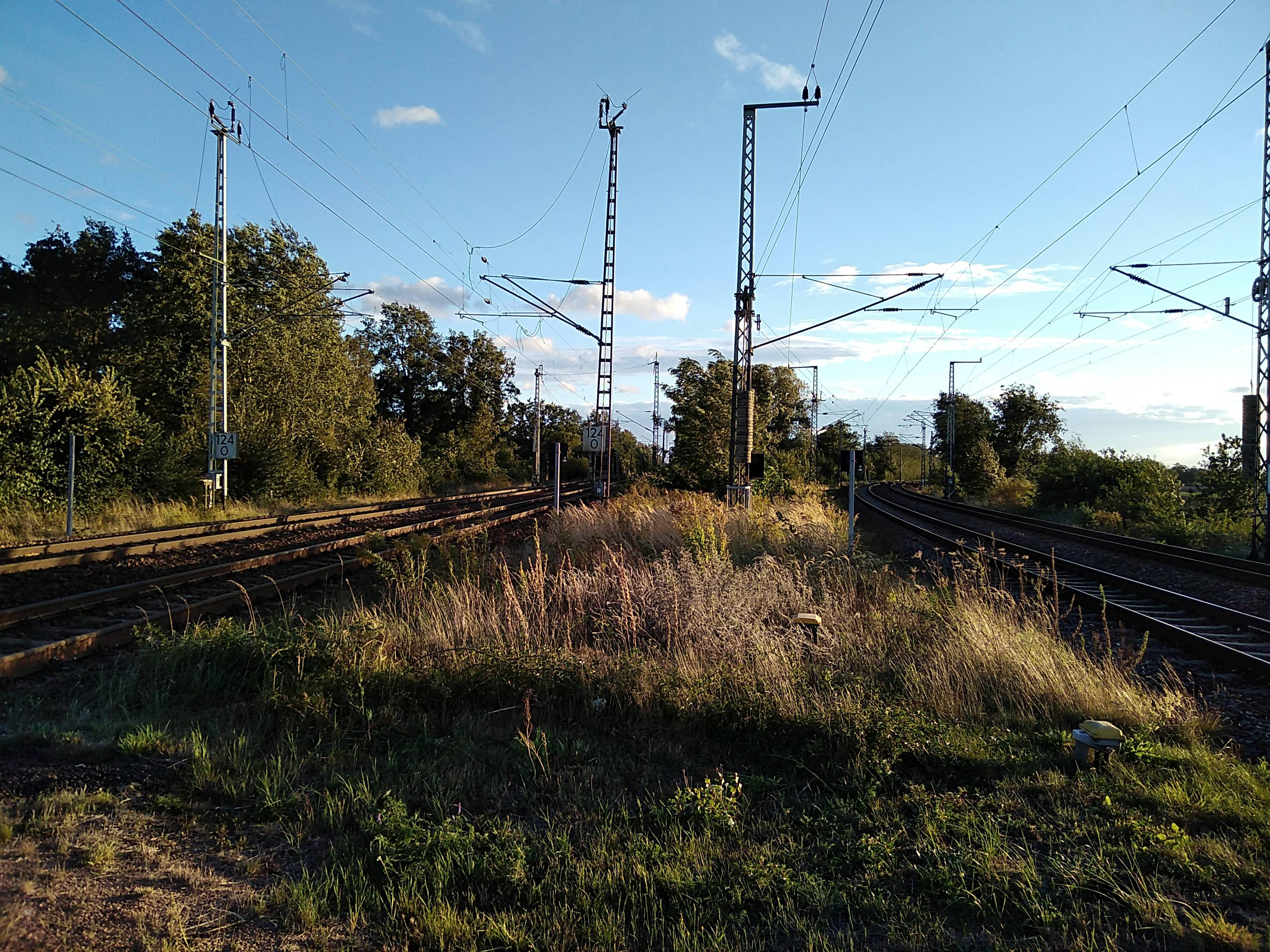 Kotschka